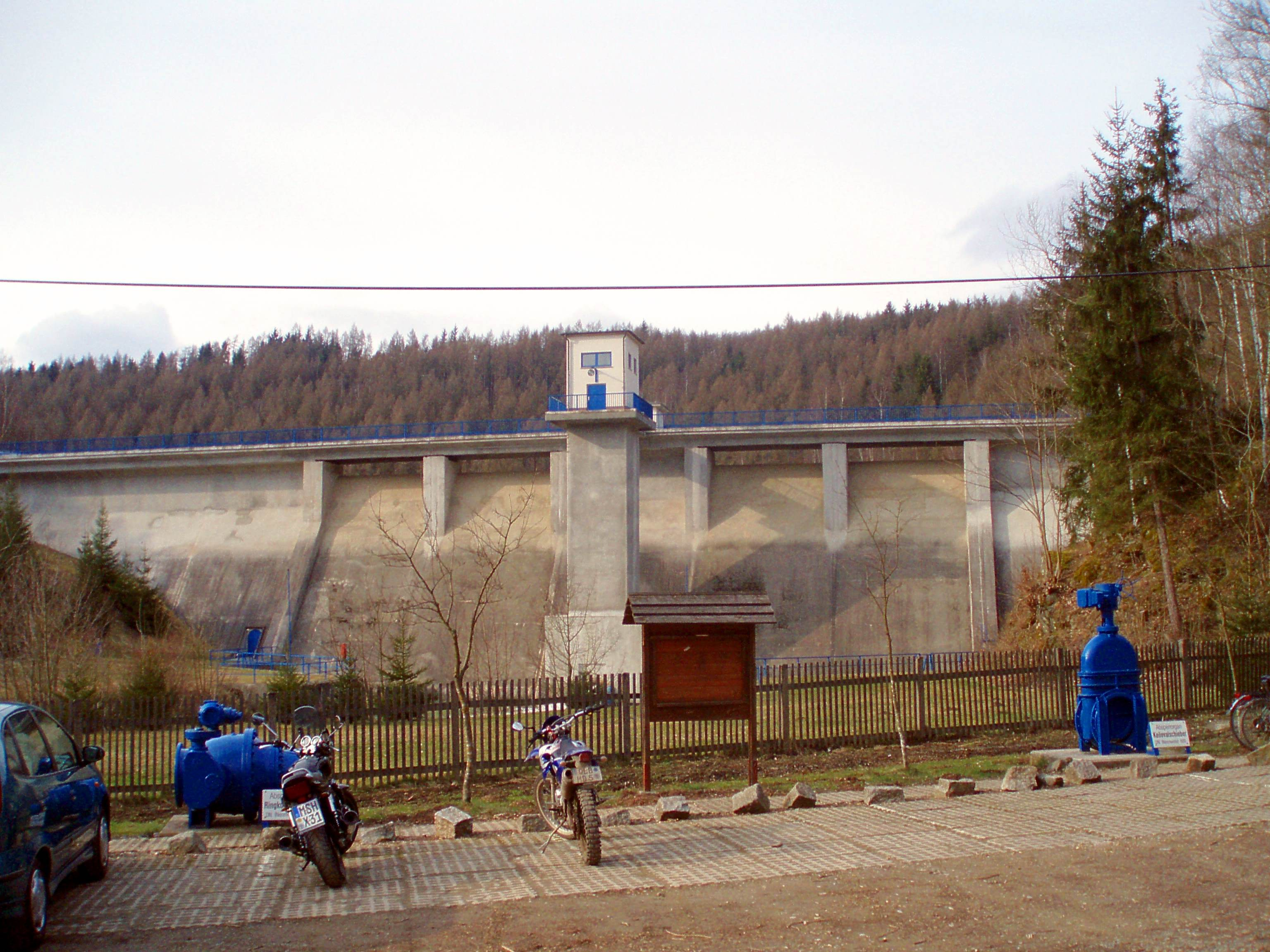 Staumauer der Talsperre Wippra